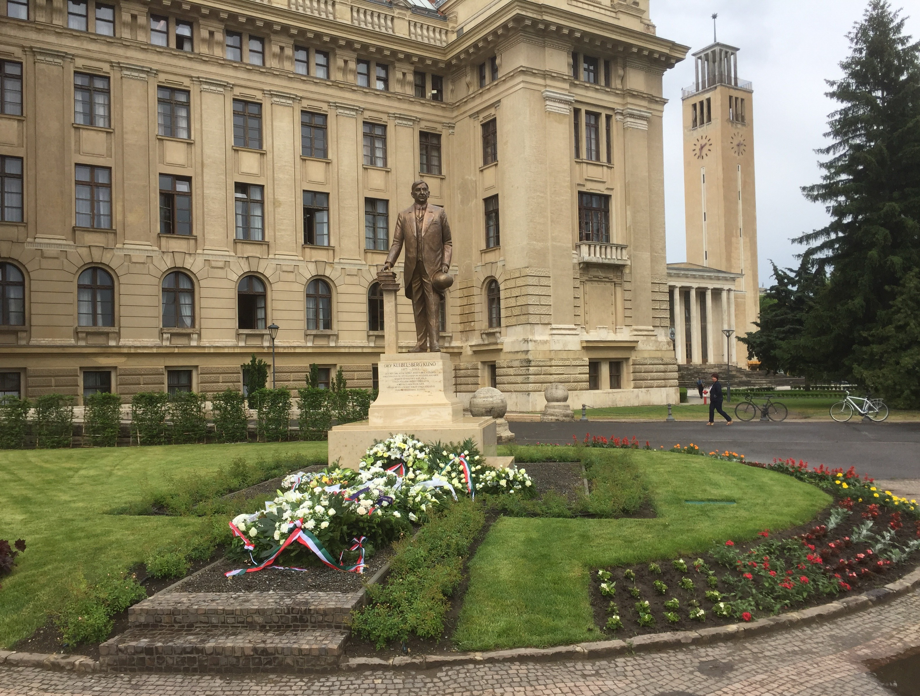 Klebelsberg Kunó szobra Debrecenben